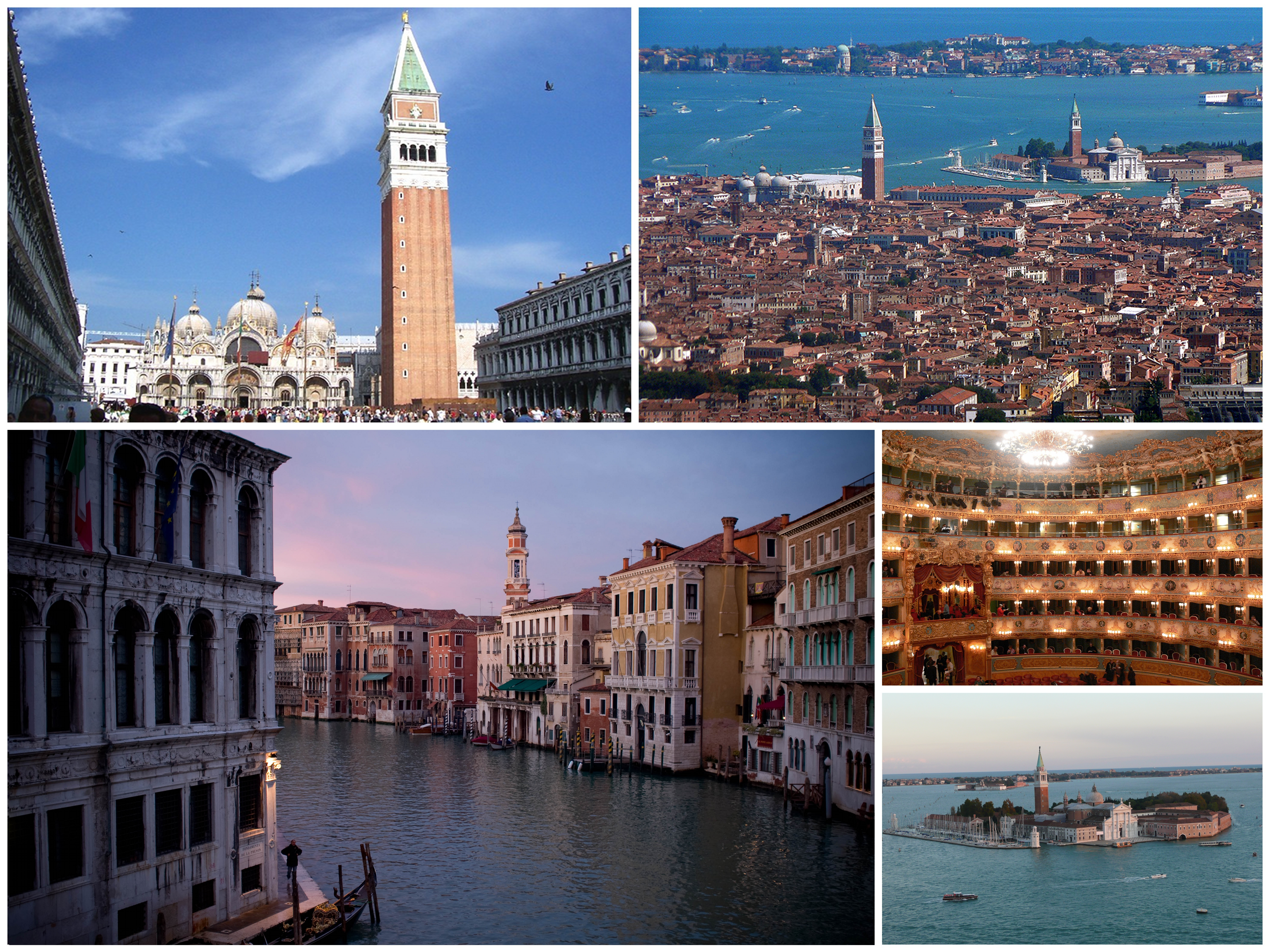 Collage di varie foto di Venezia